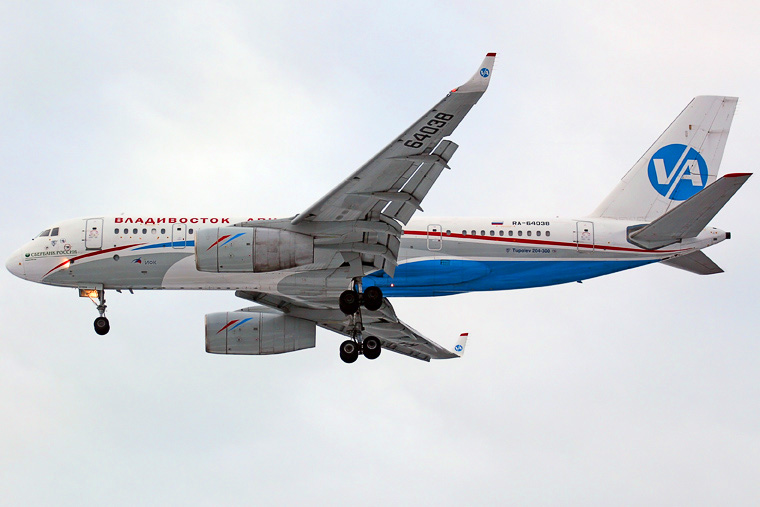 Ту-204-300 в аэропорту Внуково 17 февраля 2007.